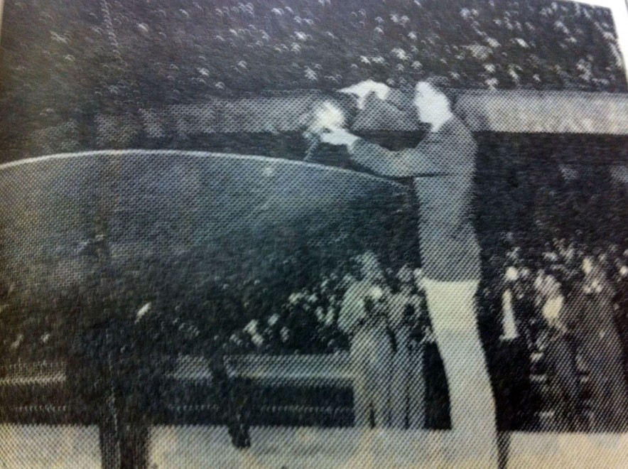 Un'atleta versa da un'anfora l'acqua raccolta sulle sponde del propio Paese e la versa in una grande vasca durante la Cerimonia d'apertura dei IV Giochi del Mediterraneo di Napoli 1963, svoltasi il 21 settembre 1963, presso lo Stadio San Paolo.